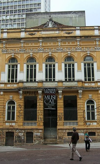 Fachada do Conservatório Dramático e Musical de São Paulo, na Av. São João, centro da capital paulista.